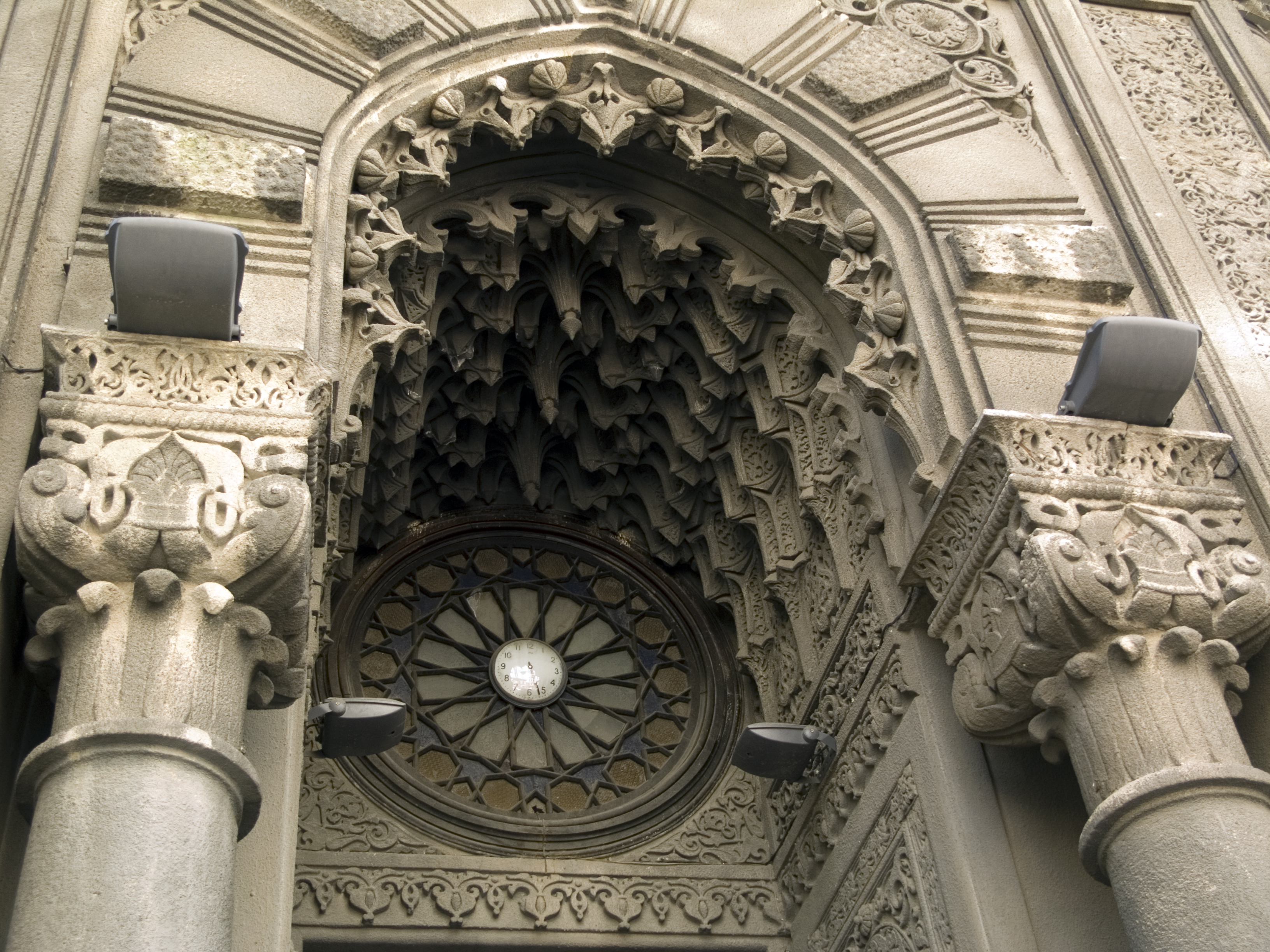 Україна, Київ - Кенаса караїмська